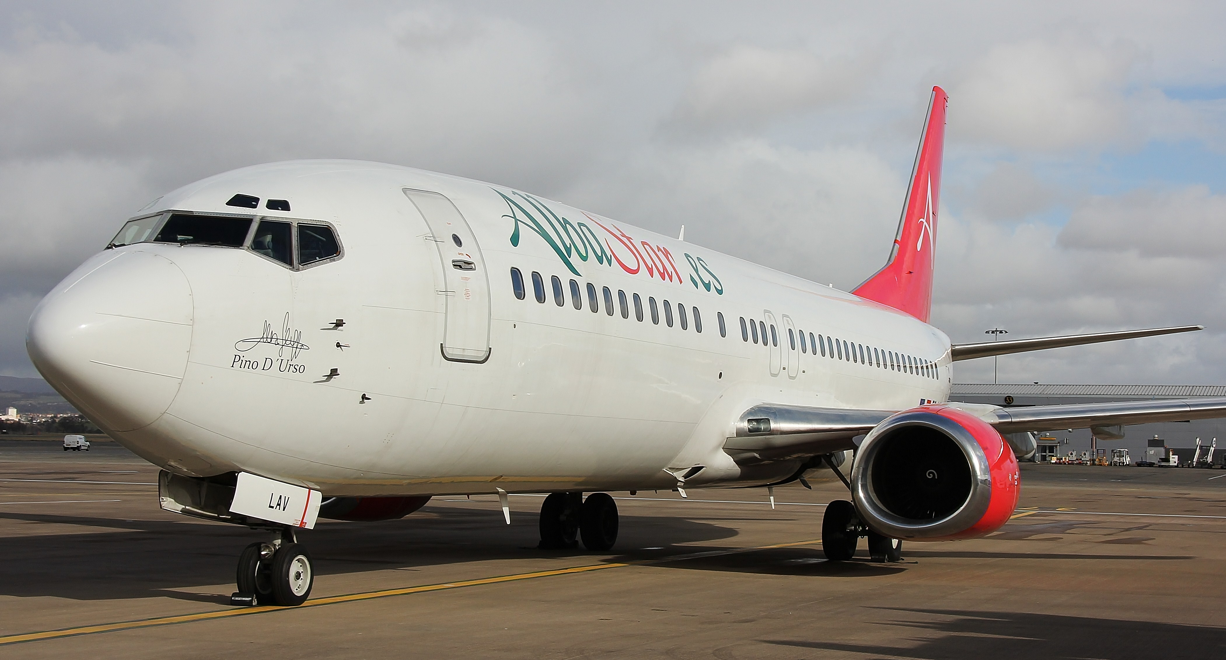 EC-LAV with Sign